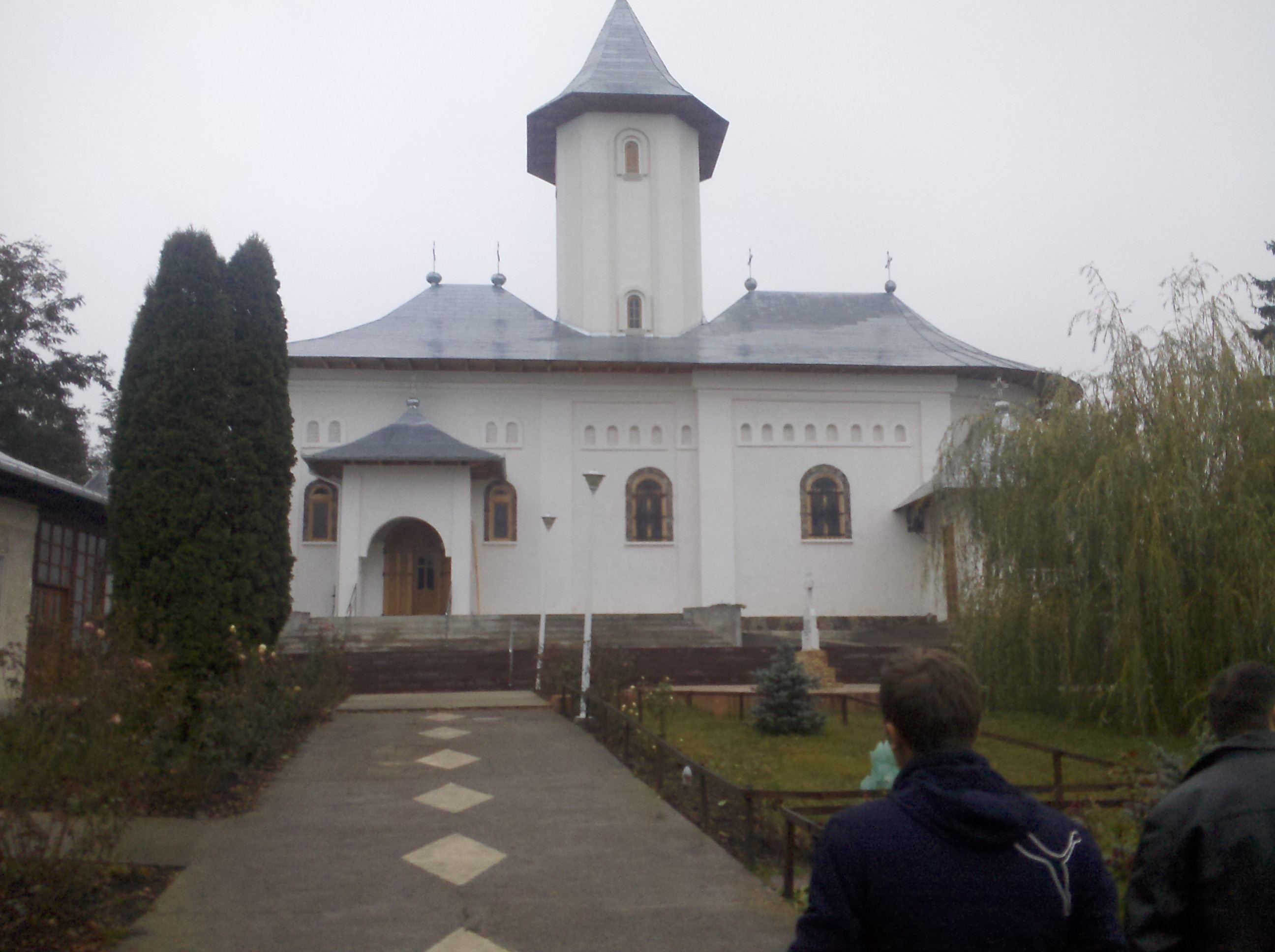 la iglesia del monasterio de Gorovei, BT